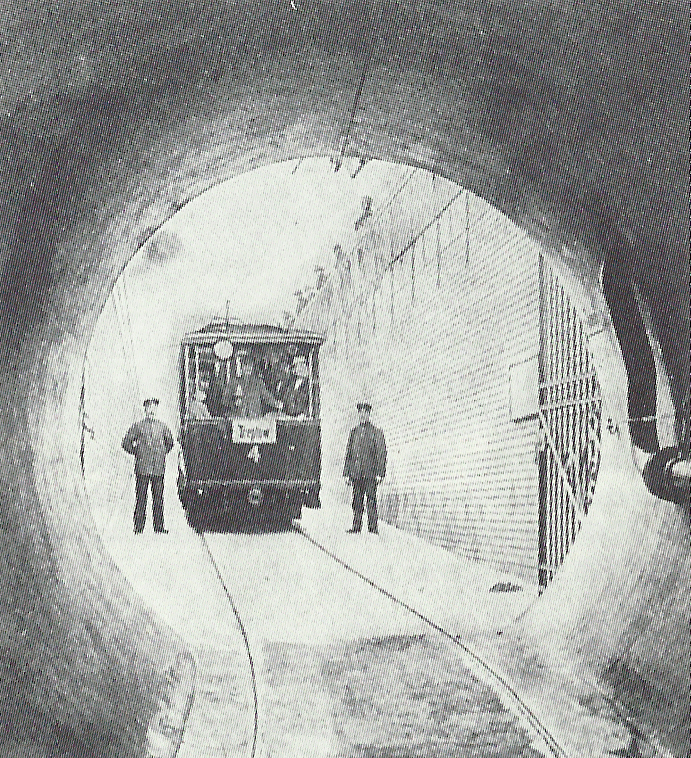 Triebwagen 4 der Berliner Ostbahnen auf der Stralauer Seite vor dem Spreetunnel